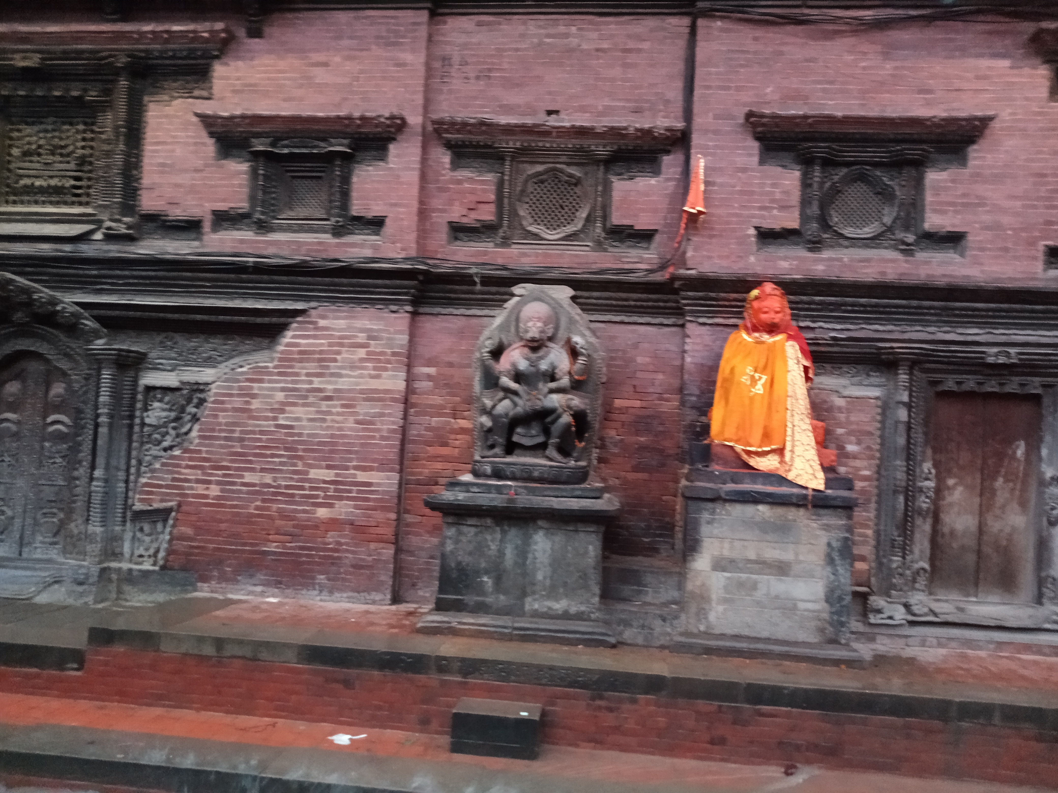 नेपाली: Patan Durbar Square Narasimha